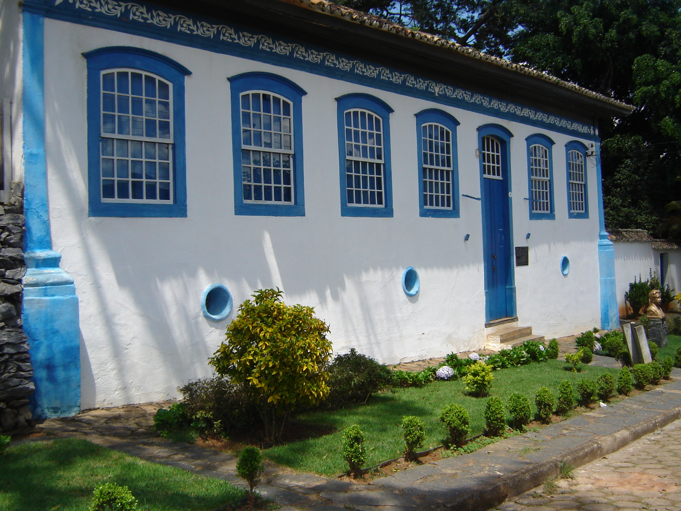 Casa de Oswaldo Cruz em São Luís do Paraitinga, São Paulo.